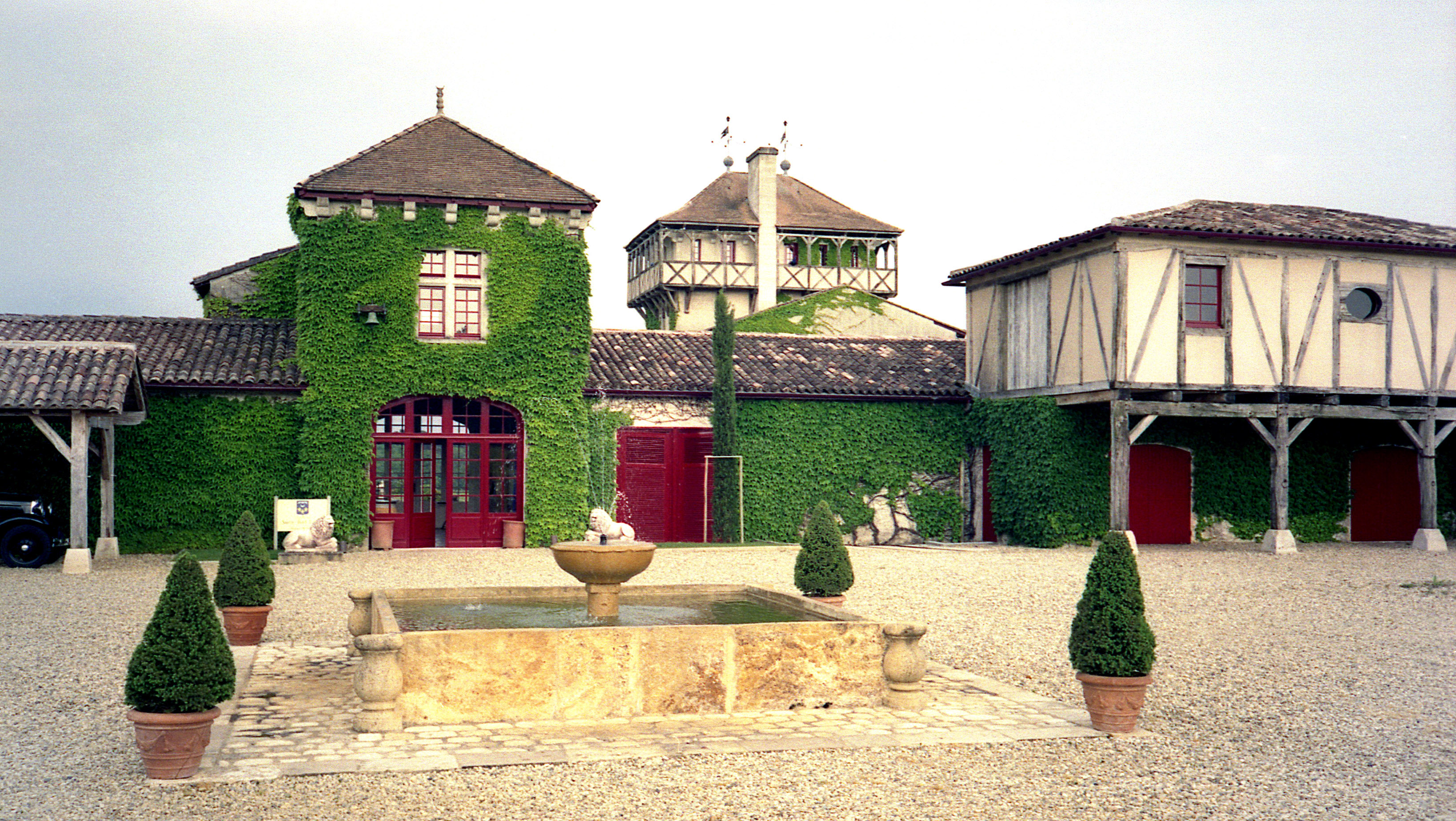 Château Smith-Haut-Lafitte - Bordeaux - Pessac-Léognan